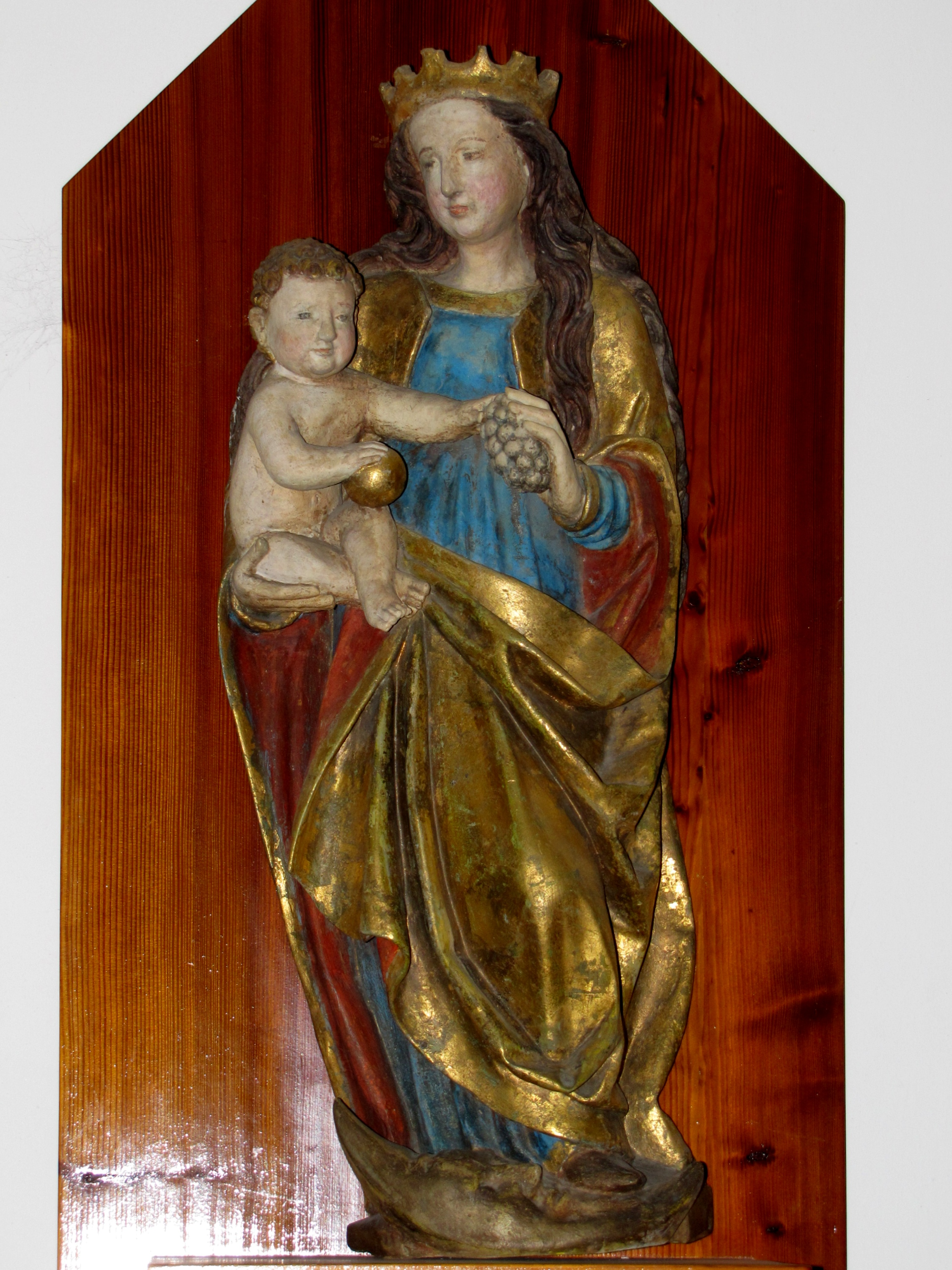 Pozdněgotická plastika Madony s Ježíškem z přelomu 15. a 16. století v kostele Nanebevzetí Panny Marie v Kyjově. V levé ruce drží hrozen a stojí na půlměsíci - symbolika nanebevzetí.